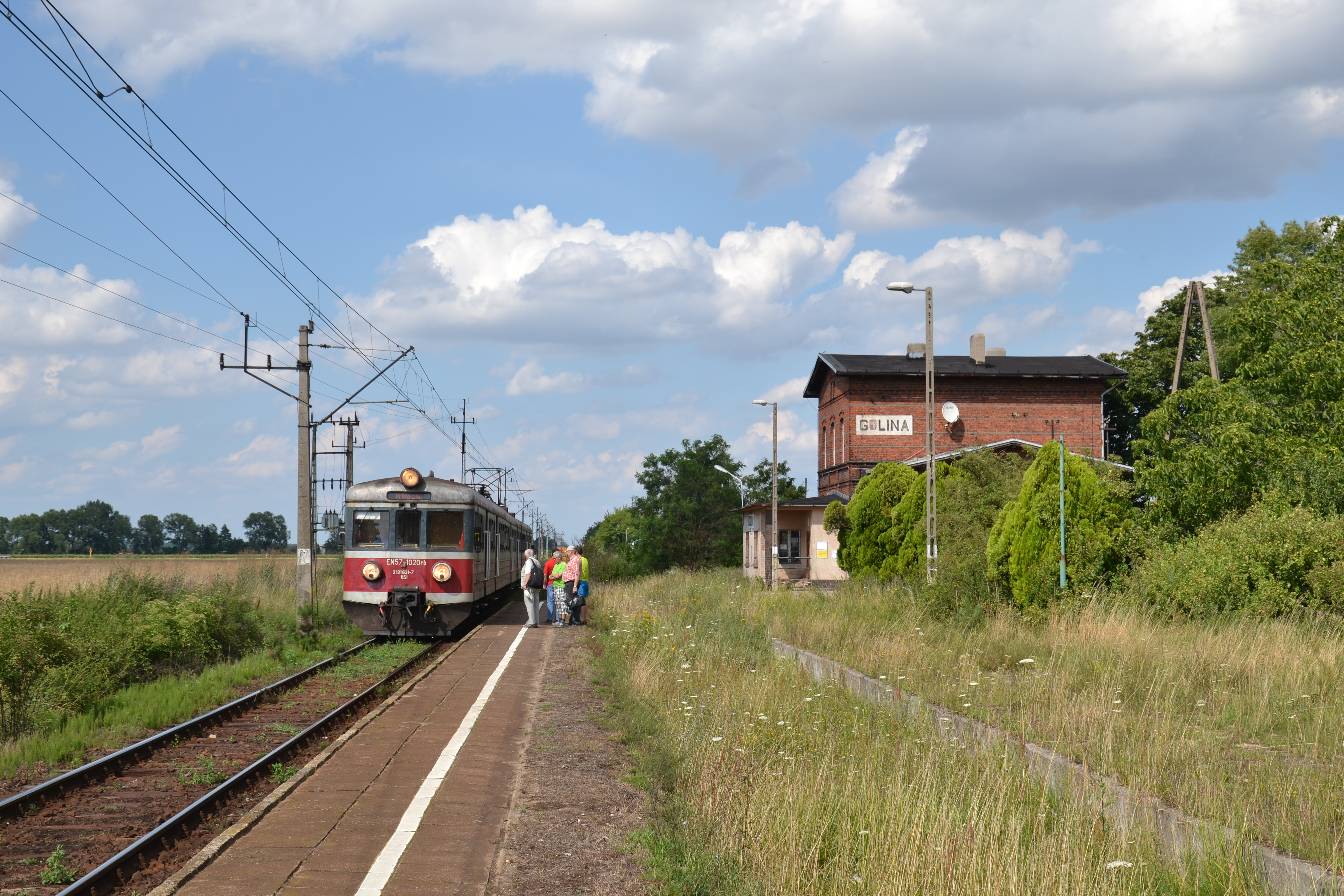 Wjazd EN57-1020 na przystanek kolejowy w Golinie